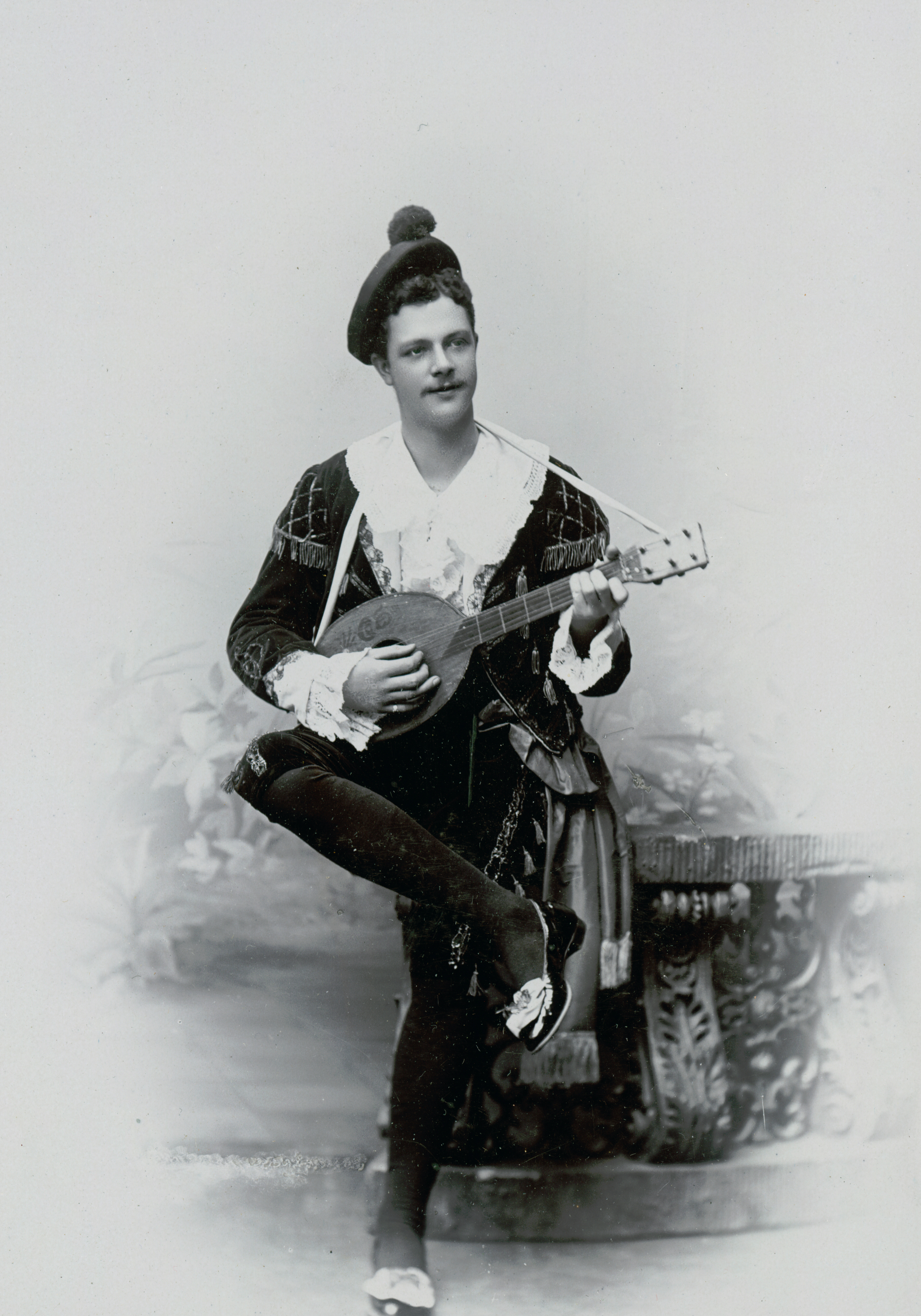 Skådespelaren August Svensson i sin debutroll som Farinelli vid Södra teatern 1893